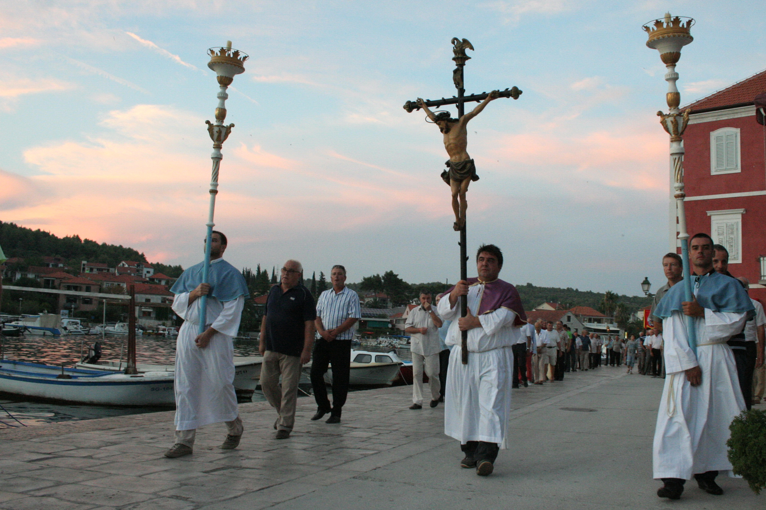 Procesija na blagdan sv. Roka u Starom Gradu